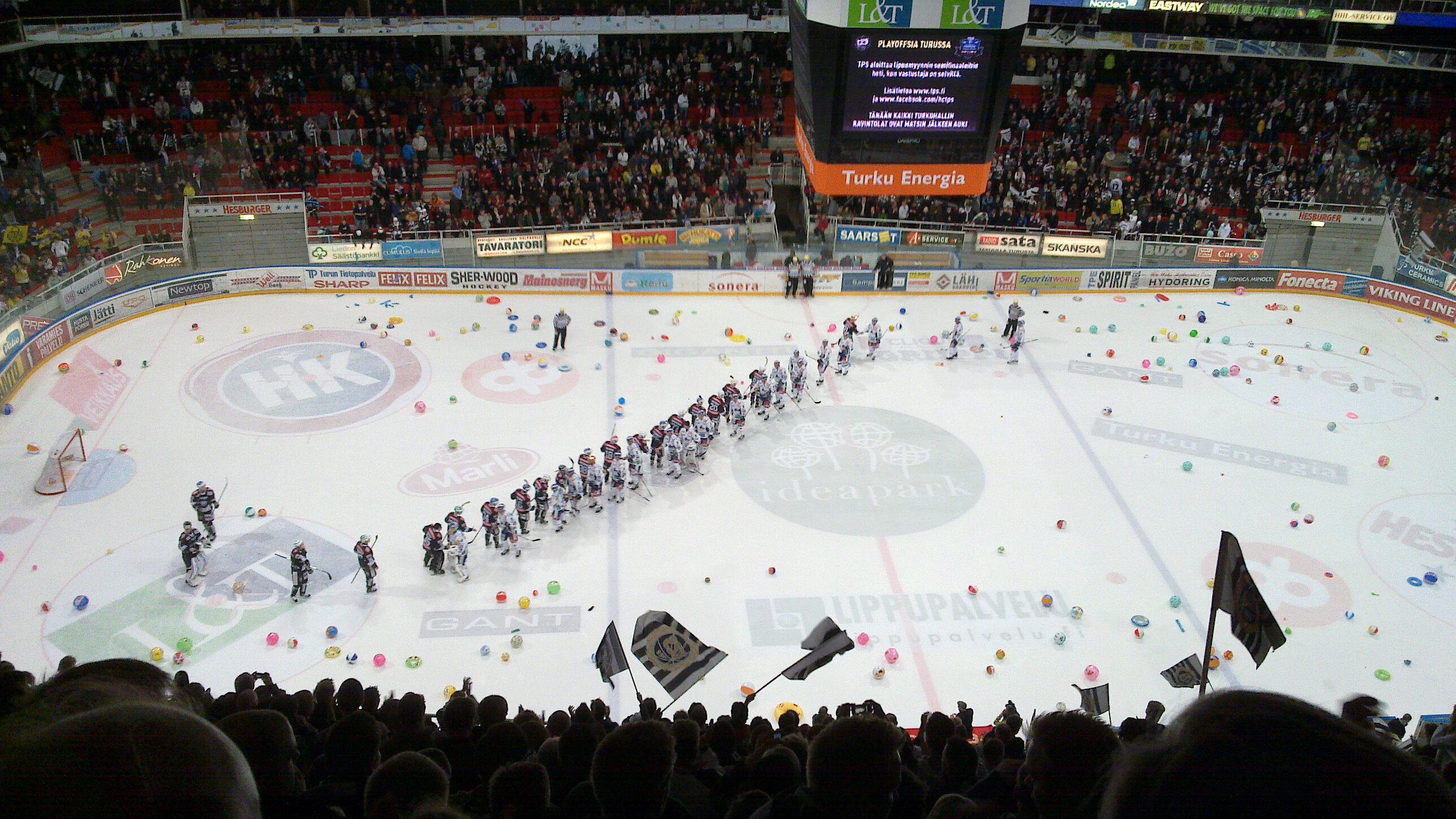 Hieno peli oli